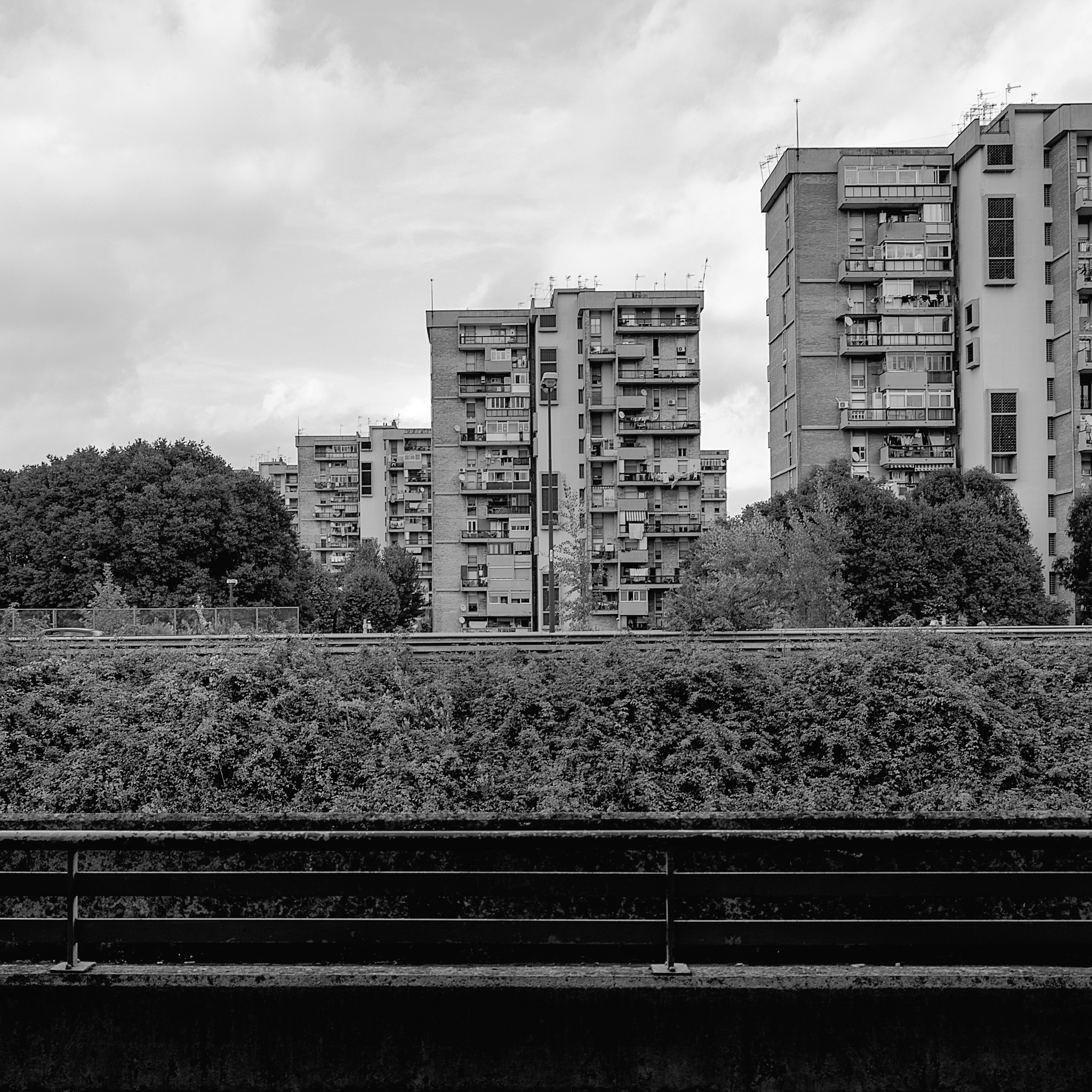 Edifici realizzati dall'Istituto Autonomo Case Popolari